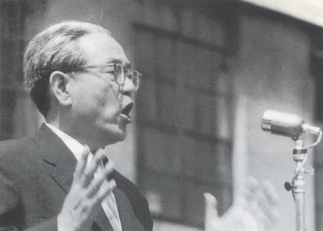 장면 박사 부통령 후보 시절 정견 발표